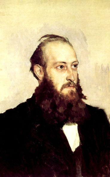 Портрет В.Н.Гошкевича, основателя историко-археологического музея в Херсоне